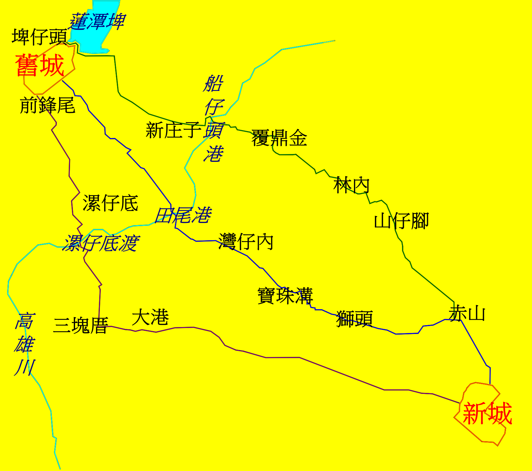 依據1989年台灣堡圖繪製之雙城古道。